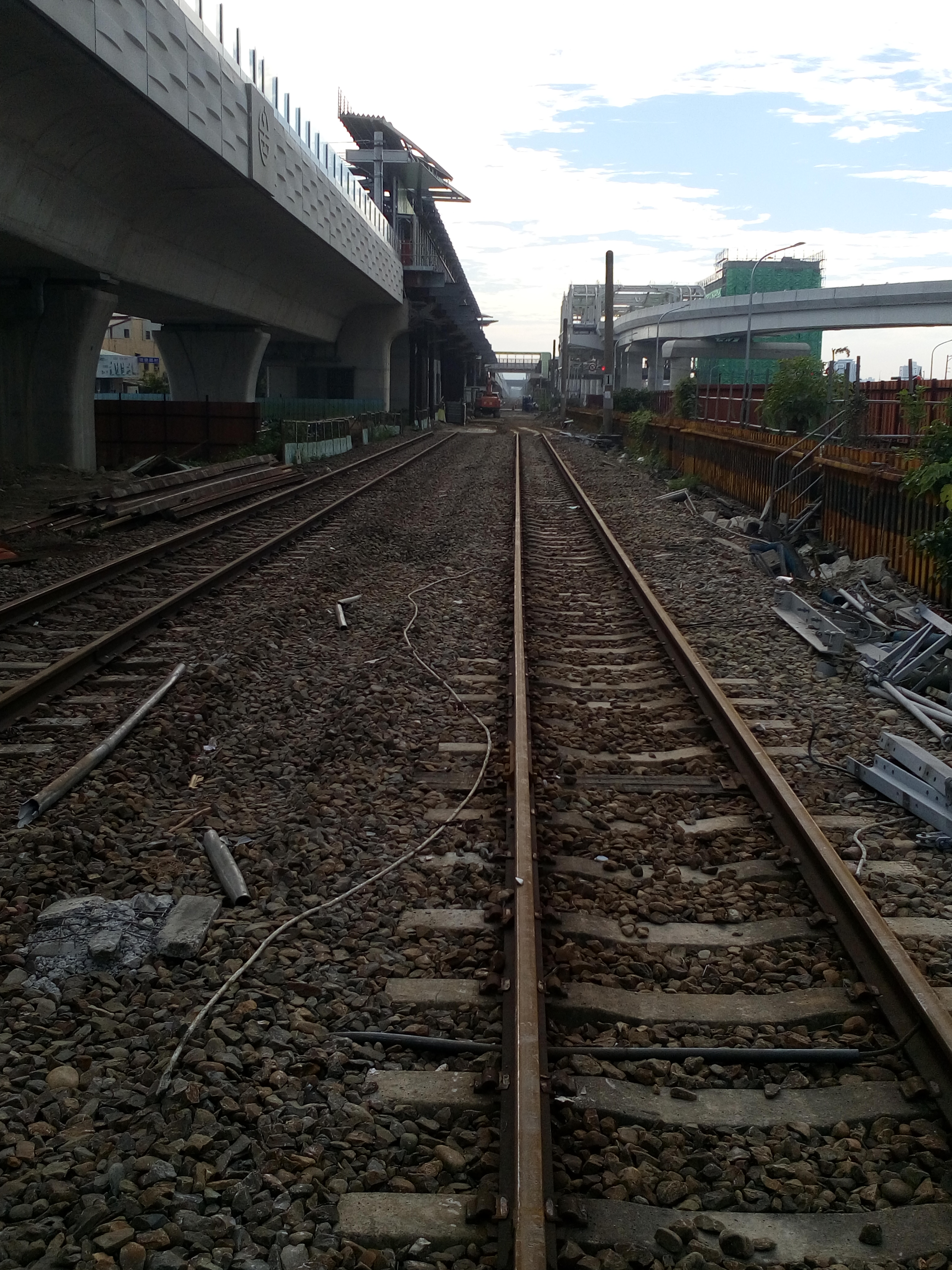 已停用的大慶段地面鐵路，2016年11月19日 這是我自己的作品。UY4Xe8VM5VYxaQQ（留言） 2016年11月21日 (一) 18:43 (UTC)